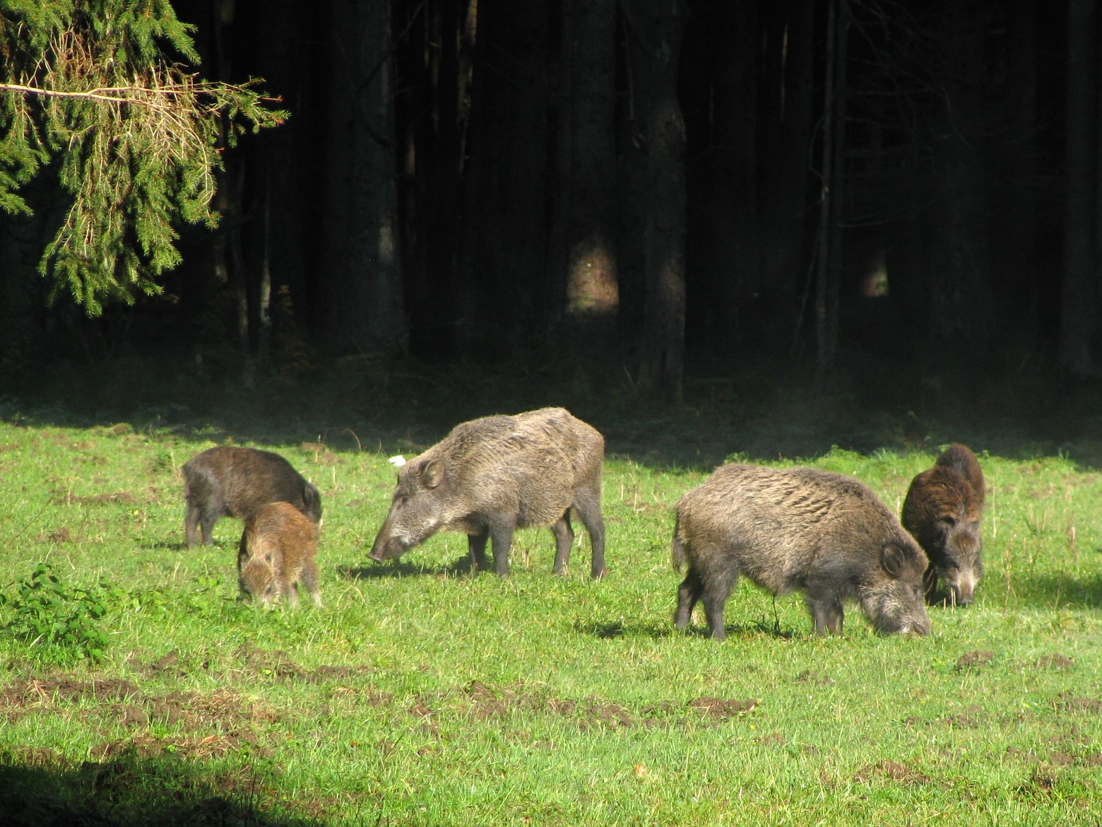 Wildschweine auf einer Lichtung im Wildpark nähe Oberdill im Forstenrieder Park